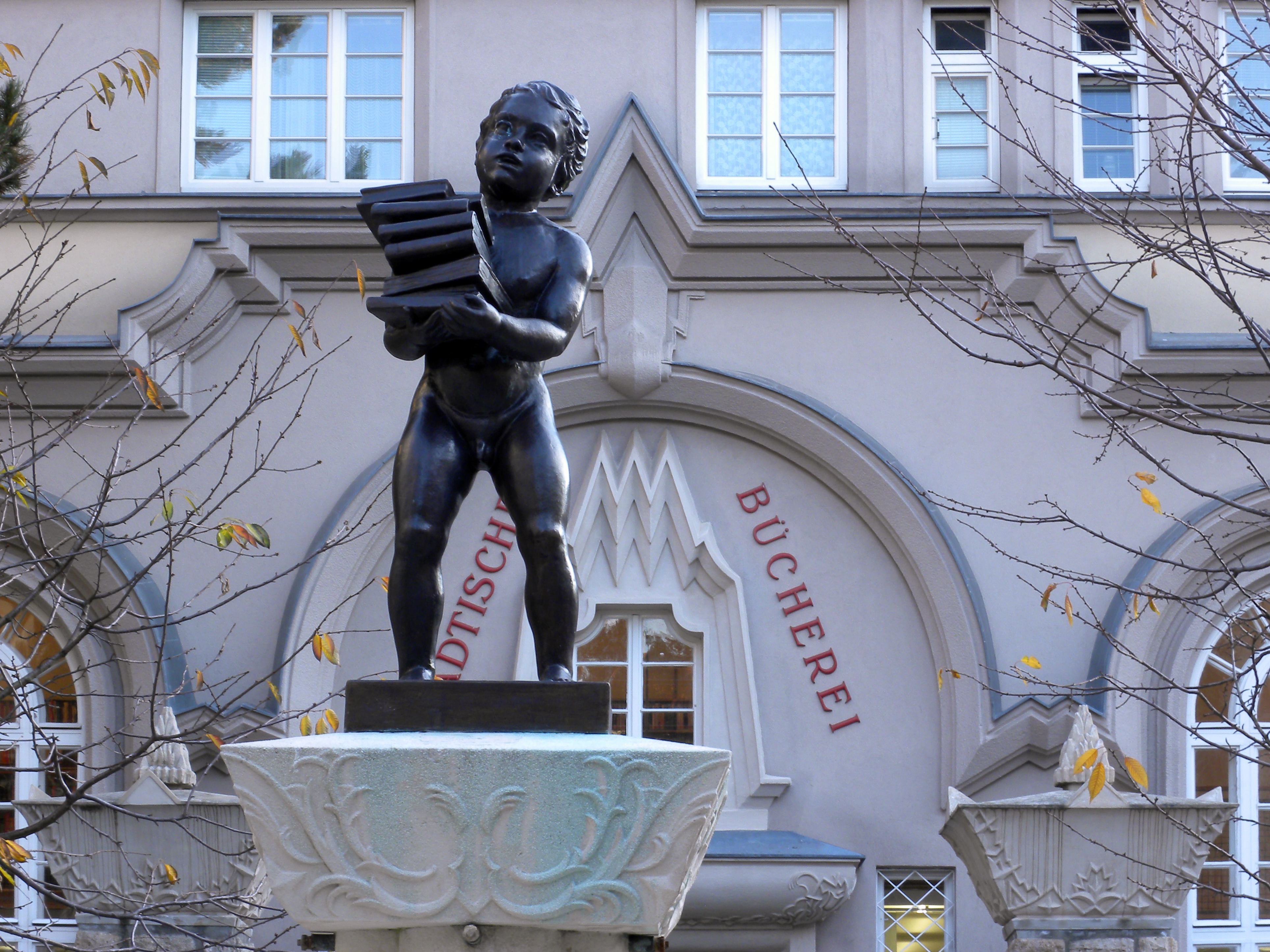 Kommunaler Wohnbau, Sandleitenhof - Brunnenfigur vor der Städtischen Bücherei